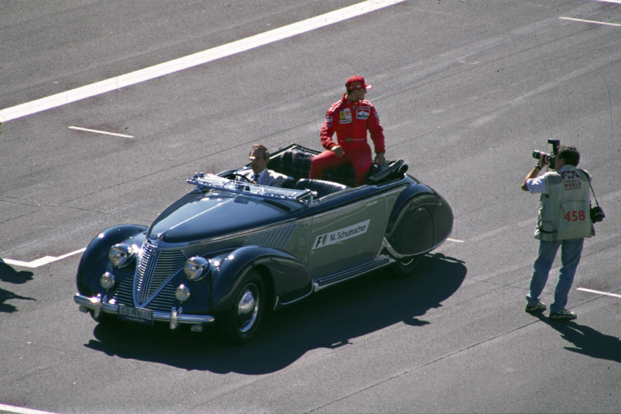 Michael Schumacher au GP de Monza en 1996 Mise en ligne le 1er février 2008